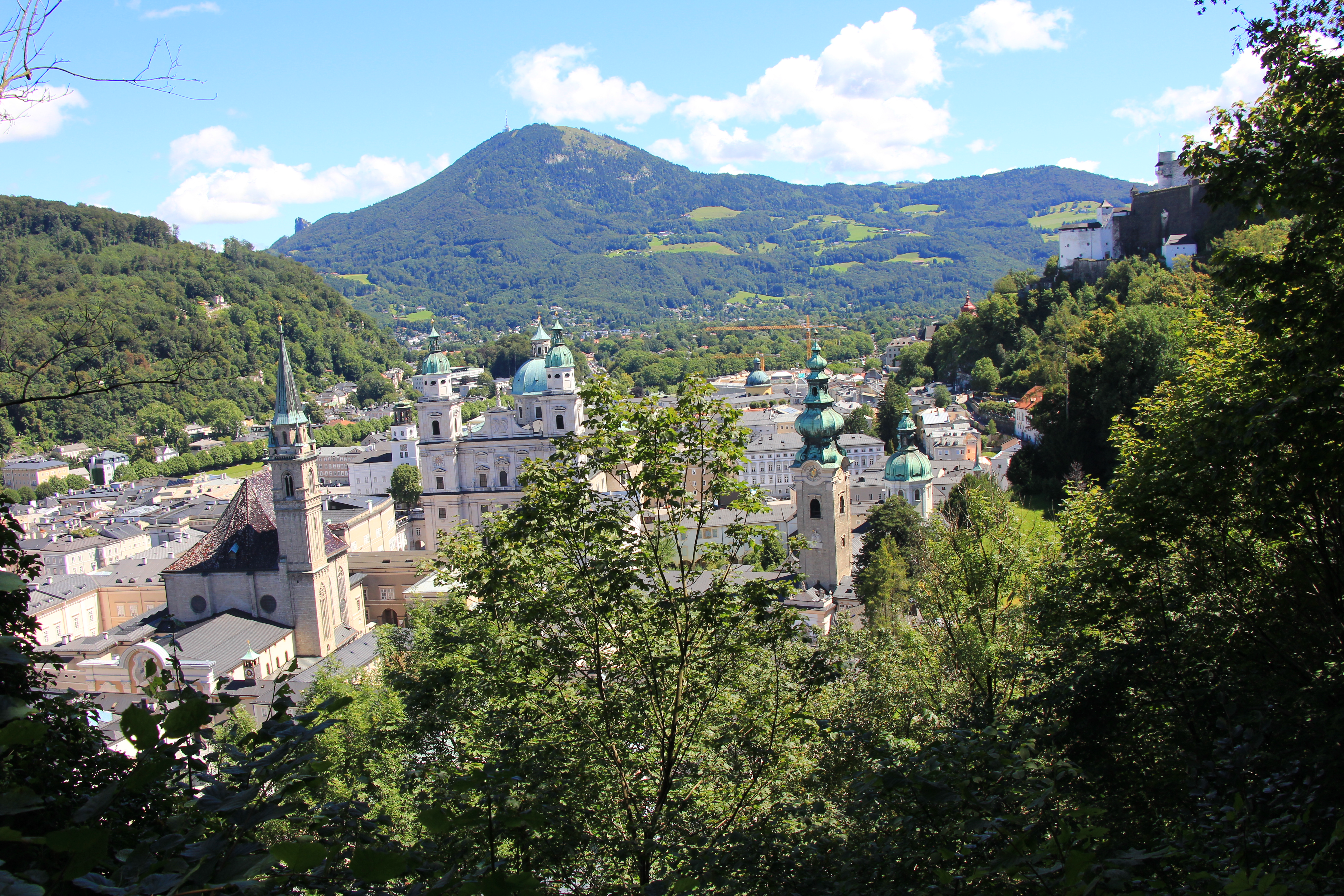 Blick auf die Dächer von Salzburg